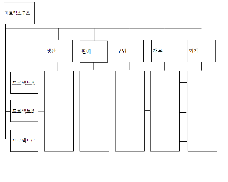 매트릭스구조